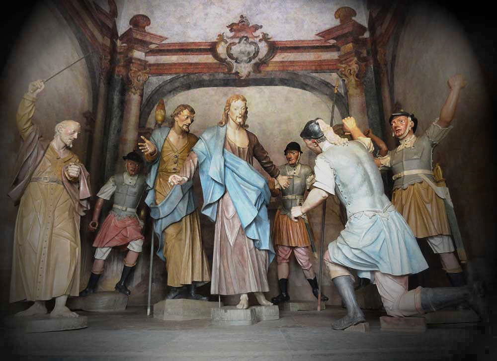 cena da prisão de Jesus, de Aleijadinho, no Santuário de Congonhas